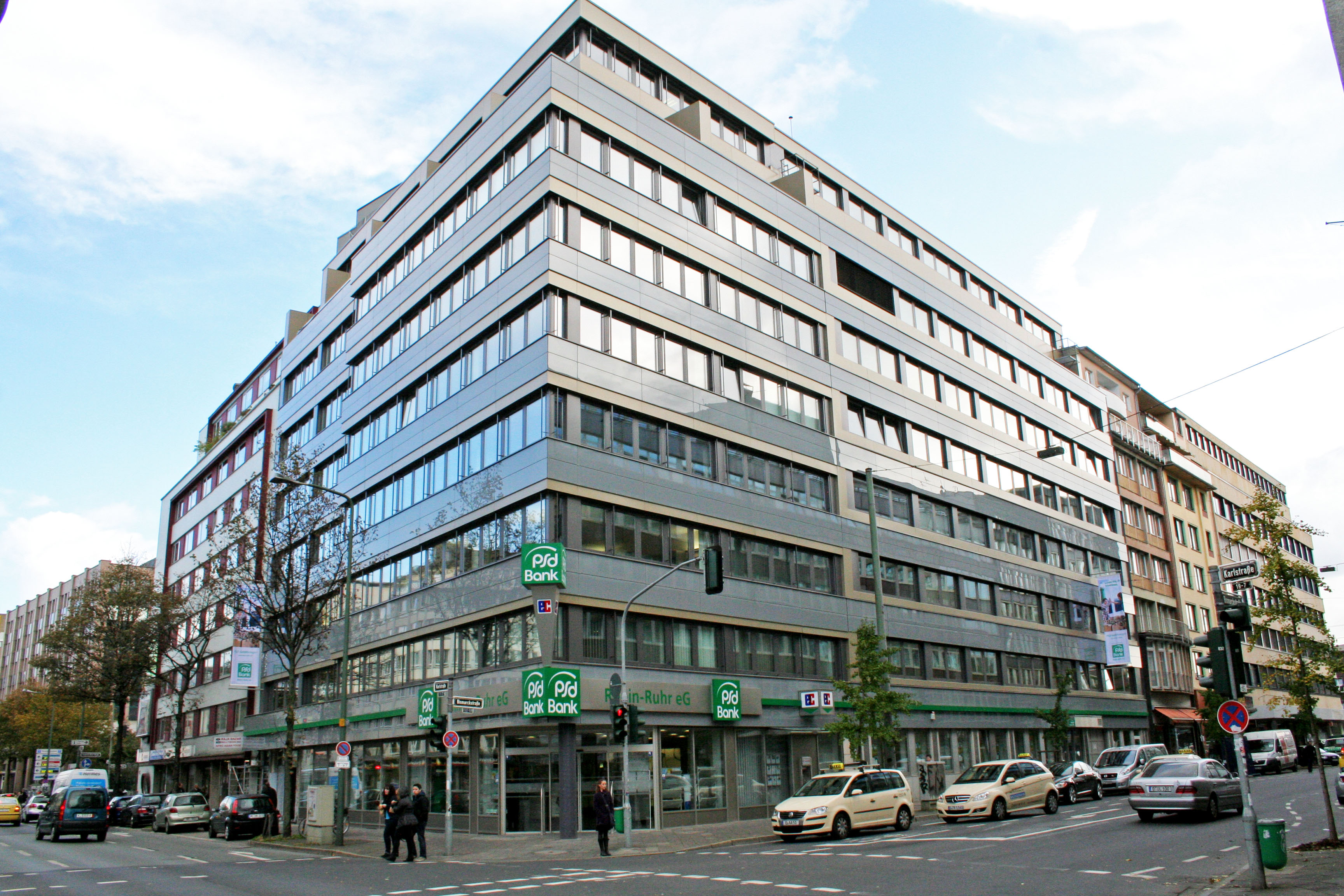 Das Foto zeigt das Gebäude der PSD Bank Rhein-Ruhr eG auf der Bismarckstr. 102, 40210 Düsseldorf